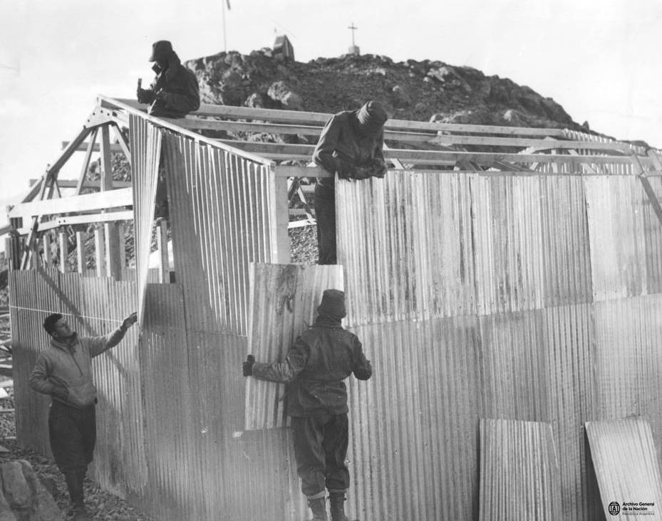 Expedición científica a la base General San Martín, en el sector argentino de la Antártida, construcción de galpones, año 1951. AGN_DDF/Inv: 197953.